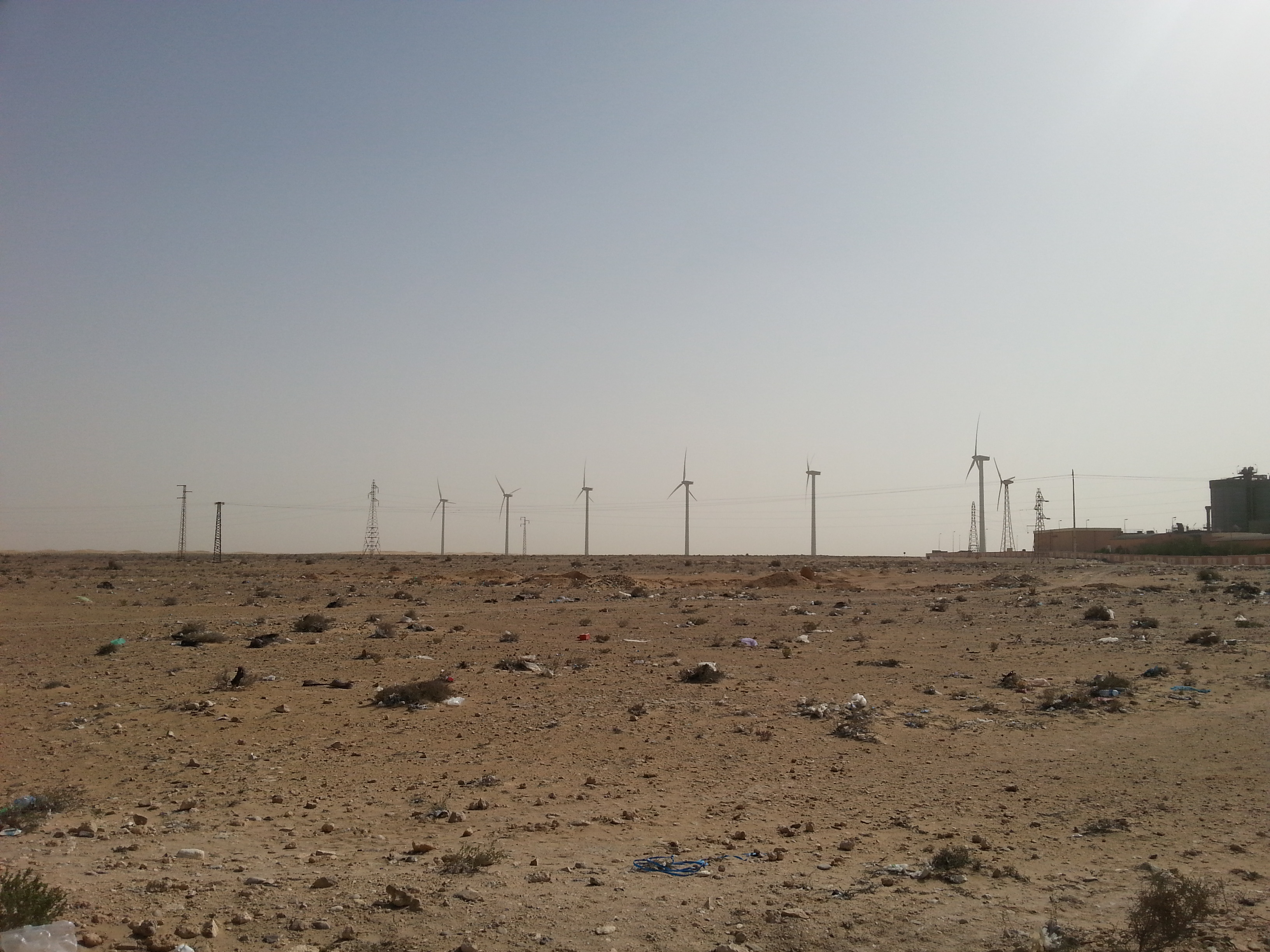 Elles sont situées vingt kilomètres au Sud de Laâyoune